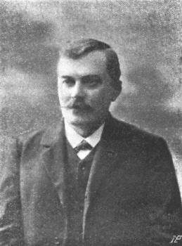 Виктор Ильич Курдиновский (17 июня 1867 —?) юрист, профессор права в Казанском и Новороссийском университетах.